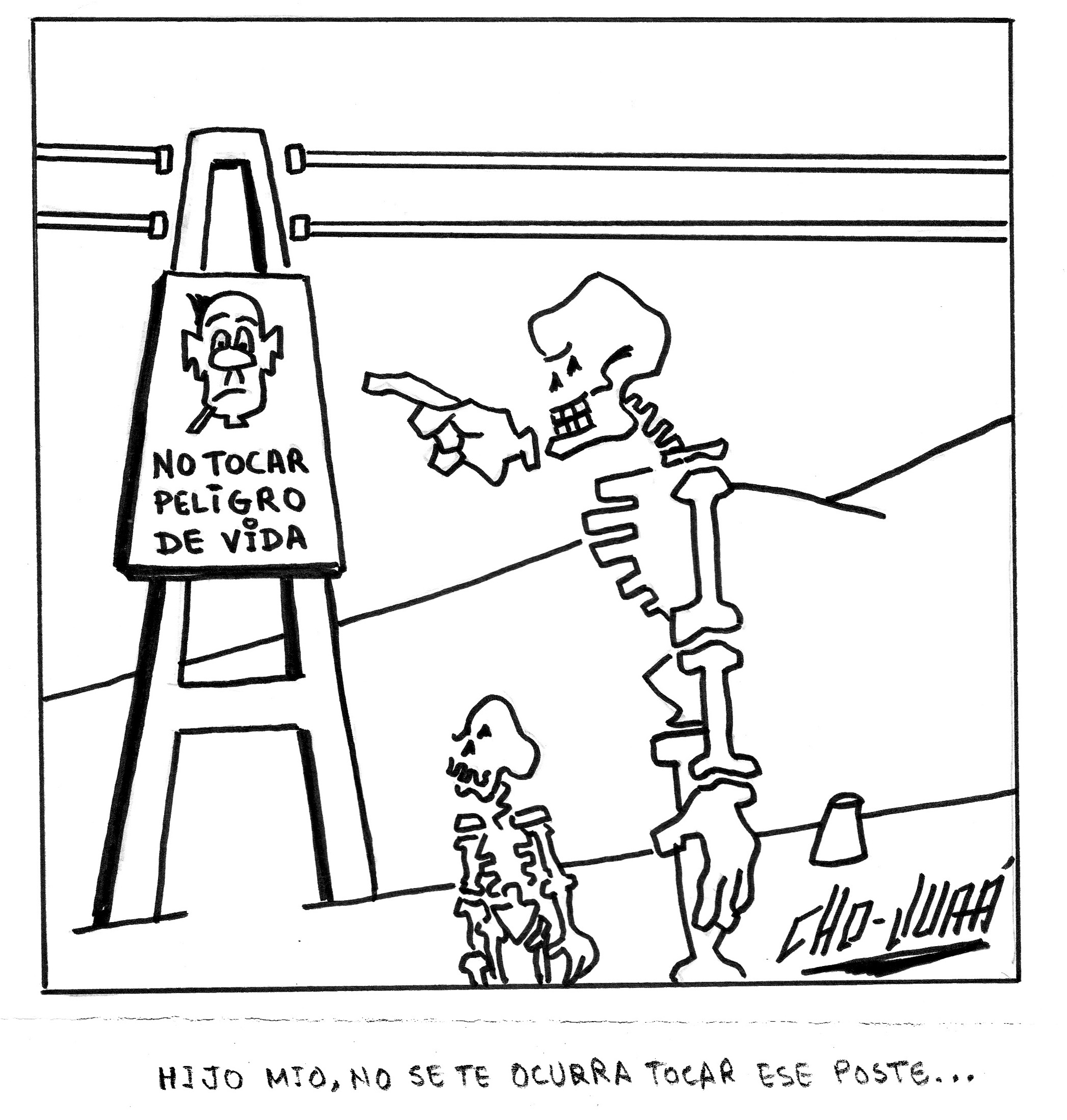 Chiste 2